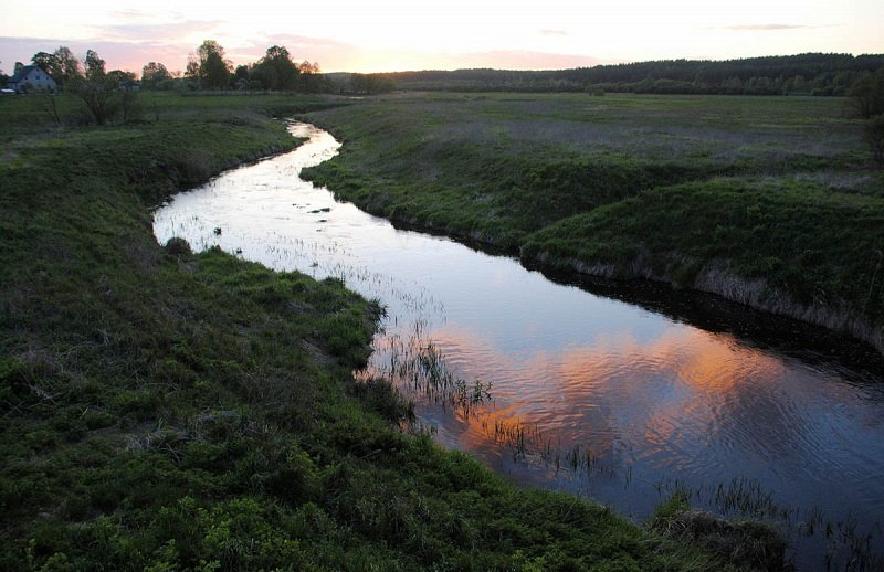 Моўчадзь. Рака Моўчадзь